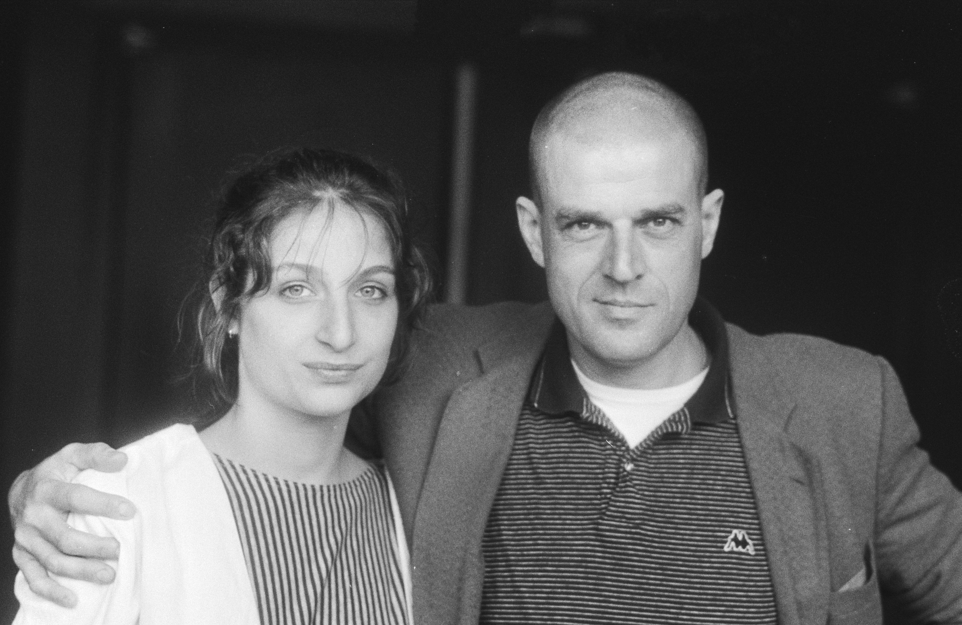 Jip Wijngaarden, die Anne Frank gaat spelen in het toneelstuk, met Jeroen Krabbé